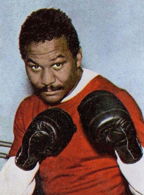 CAMPIONI dello SPORT 1973/74-Figurina n.299- JOSE' NAPOLES -PUGILATO